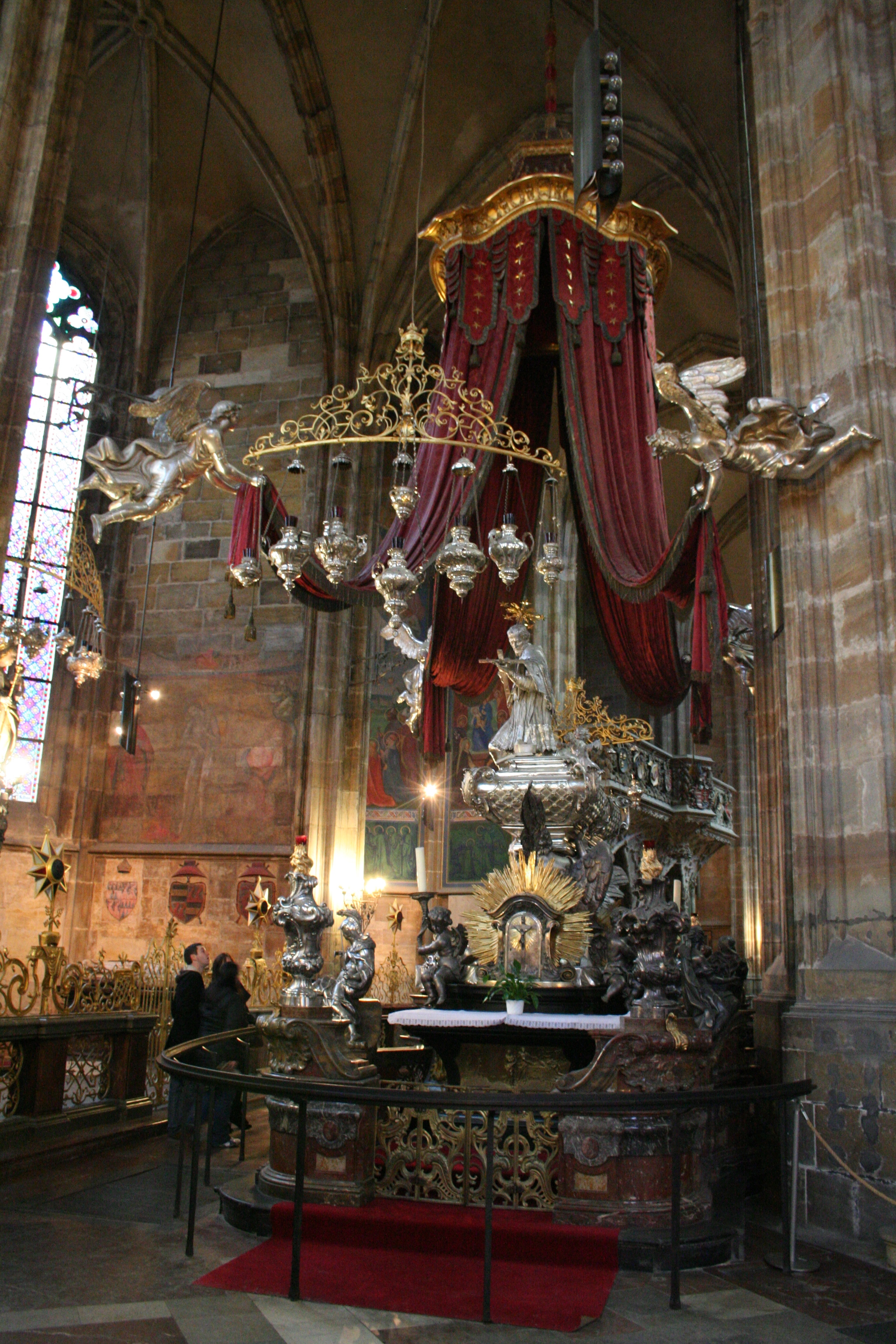 Praha, Katedrála svatého Víta, Václava a Vojtěcha, náhrobek sv. Jana Nepomuckého